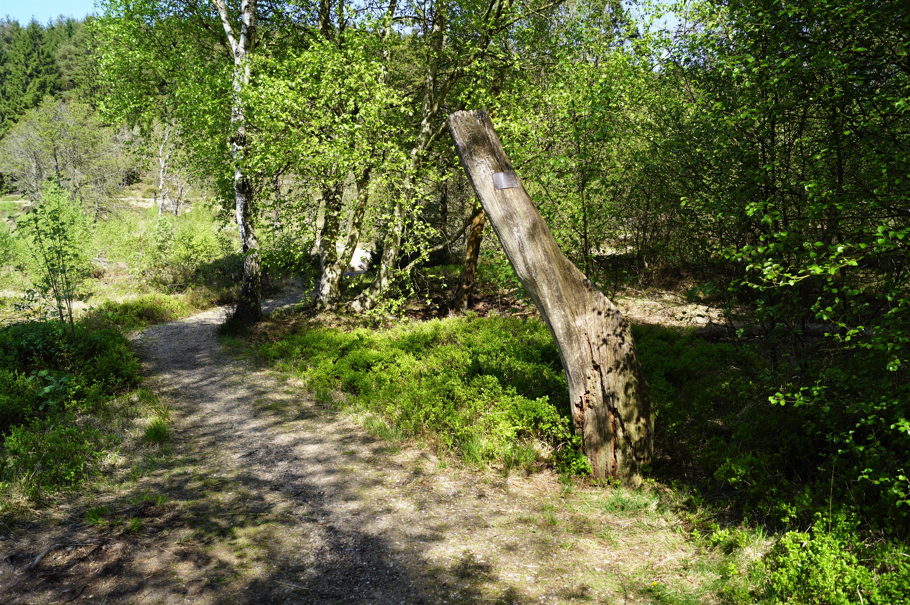 Bjældskovdal Tollundmandens findested ved østsiden af Bøllingsø